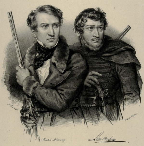 Z lewej: Michał Wołłowicz herbu Bogoria, (ur. 1806 Porzecze - zm. 4 lipca 1833 Wilno) – polski szlachcic, hrabia, działacz niepodległościowy i emigracyjny, powstaniec listopadowy, uczestnik partyzantki Józefa Zaliwskiego w 1833z prawej Leon PrzecławskiБеларуская (тарашкевіца): Міхал Валовіч, Лявон Працлаўскі